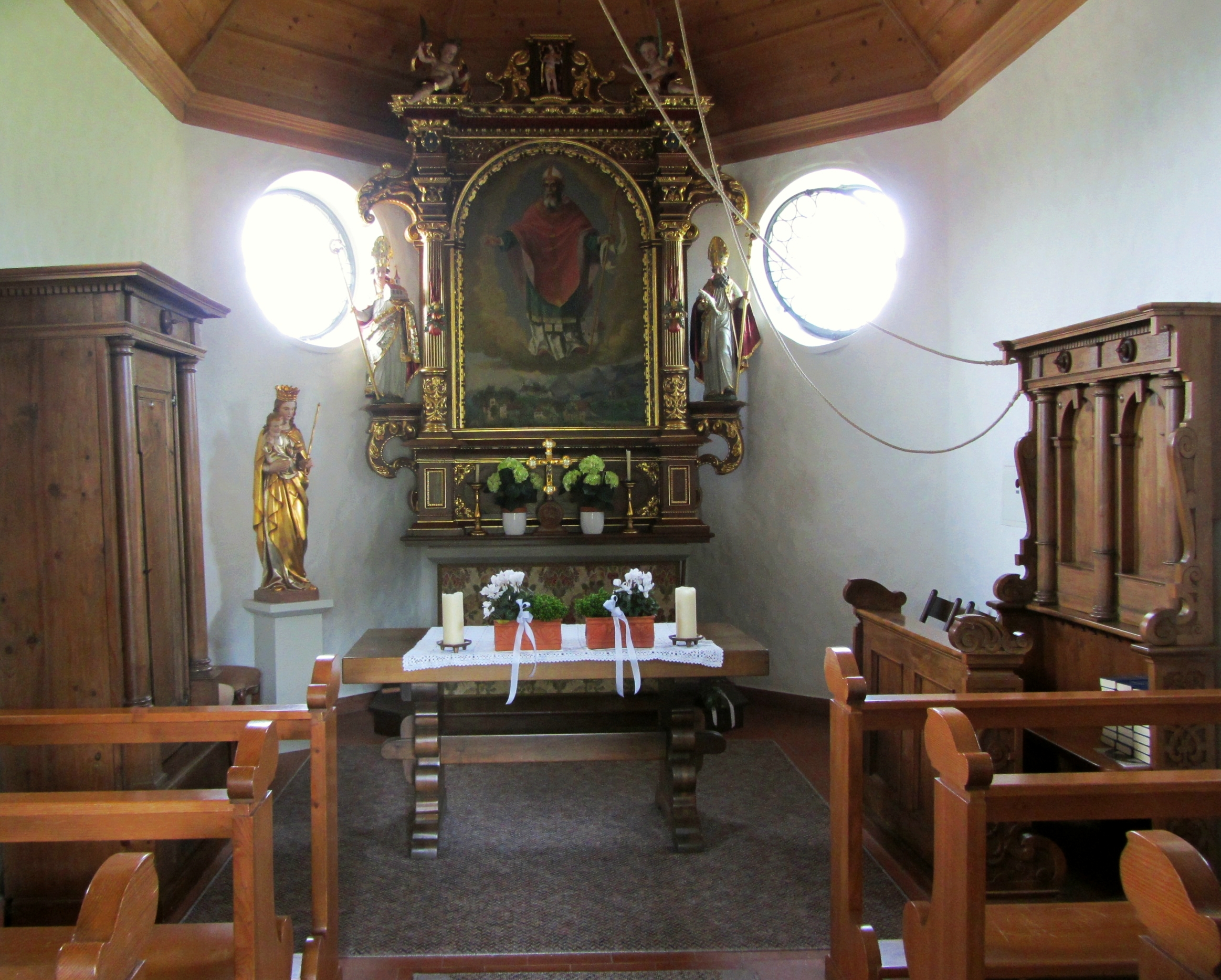 Kapelle St. Wolfgang, St. Gallen, Chor